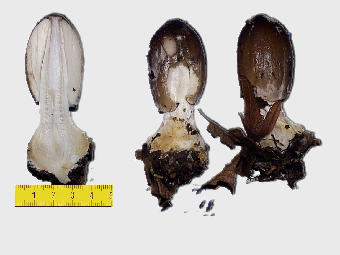 coprin noir d'encre - Savoie 1998